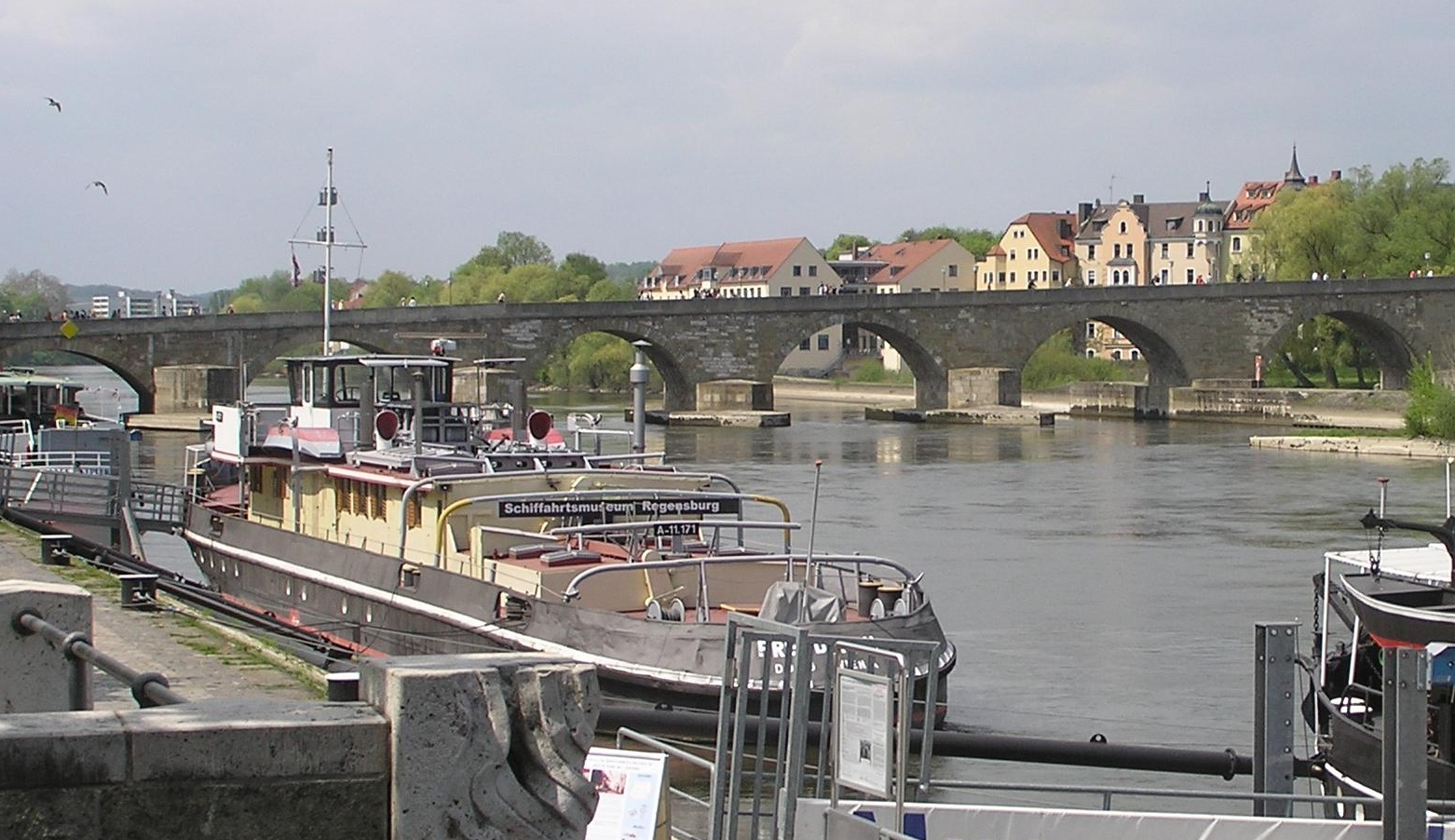 Die „Freudenau“ des Donau-Schifffahrtmuseums Regensburg.